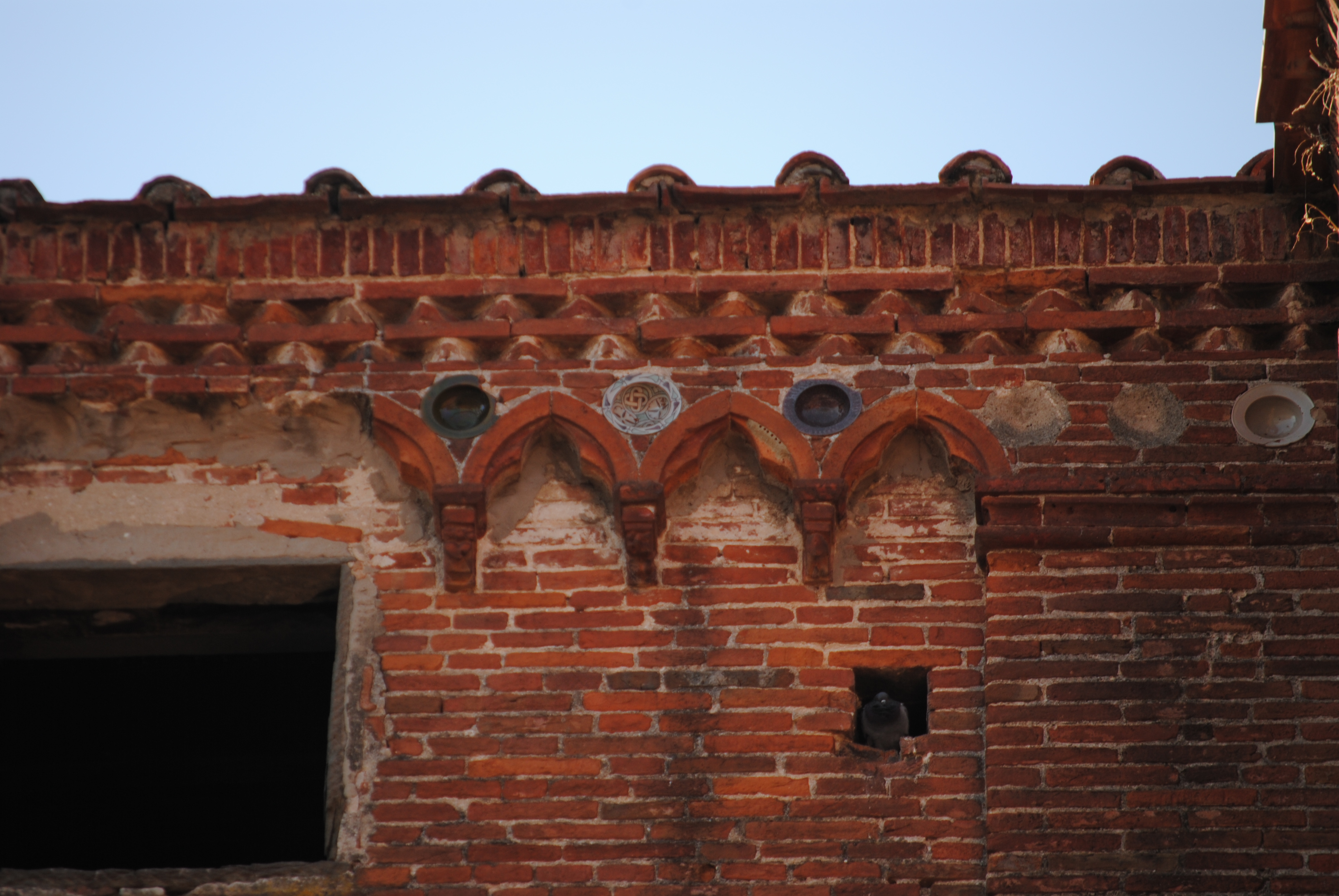 Bacini ceramici che ornano la parete esterna dell'abside (particolare). I bacini sono inseriti sopra le giunture degli archetti ciechi trilobati. In molti casi si tratta di maioliche arcaiche pisane ma non mancano esempi di ceramiche importate. I pezzi originali sono stati asportati dalle pareti e sostituiti con delle copie. Oggi sono conservati nel Museo nazionale di San Matteo.